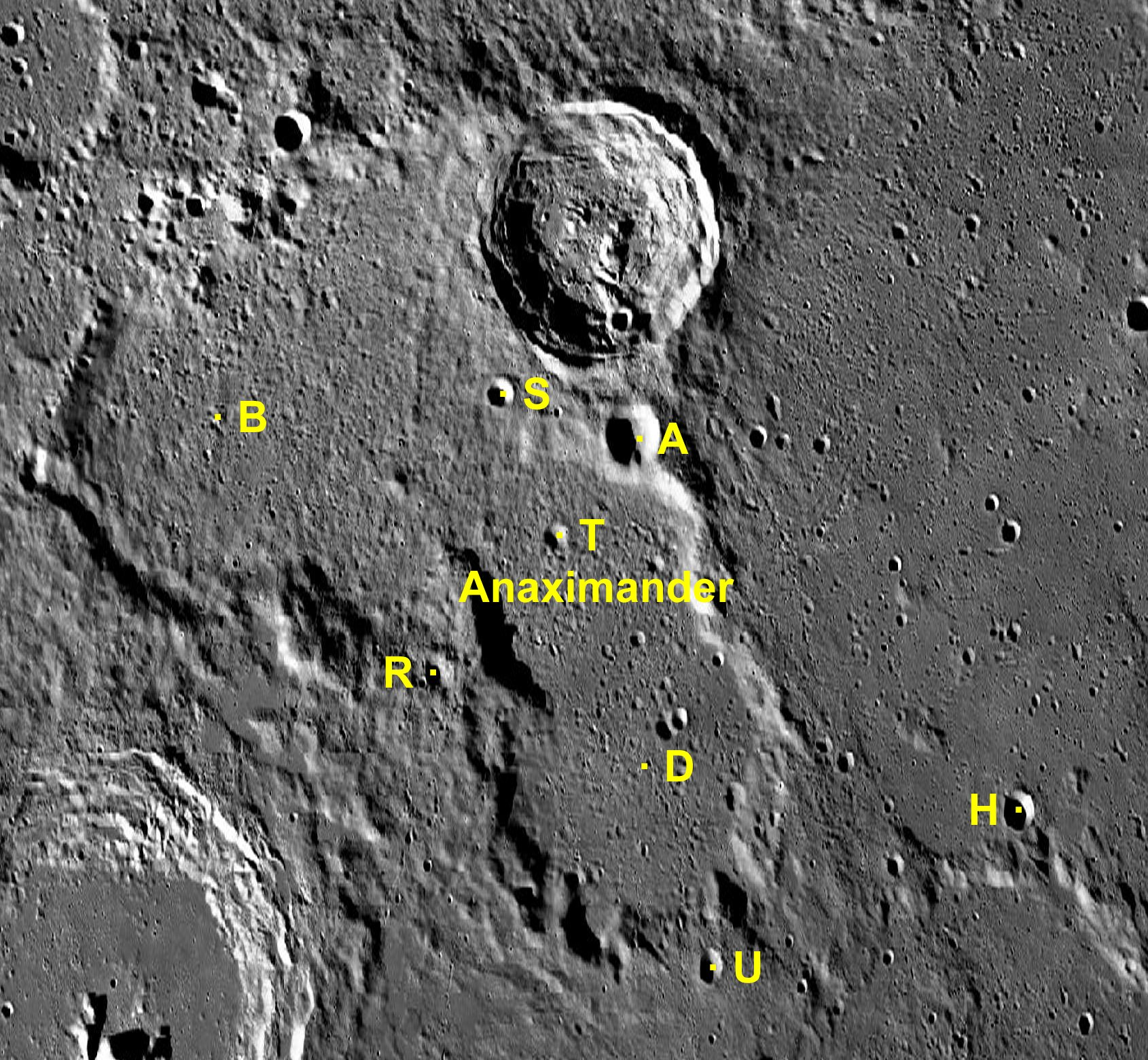 Cráter lunar Anaximander. Cráteres satélite. (Imagen LRO)